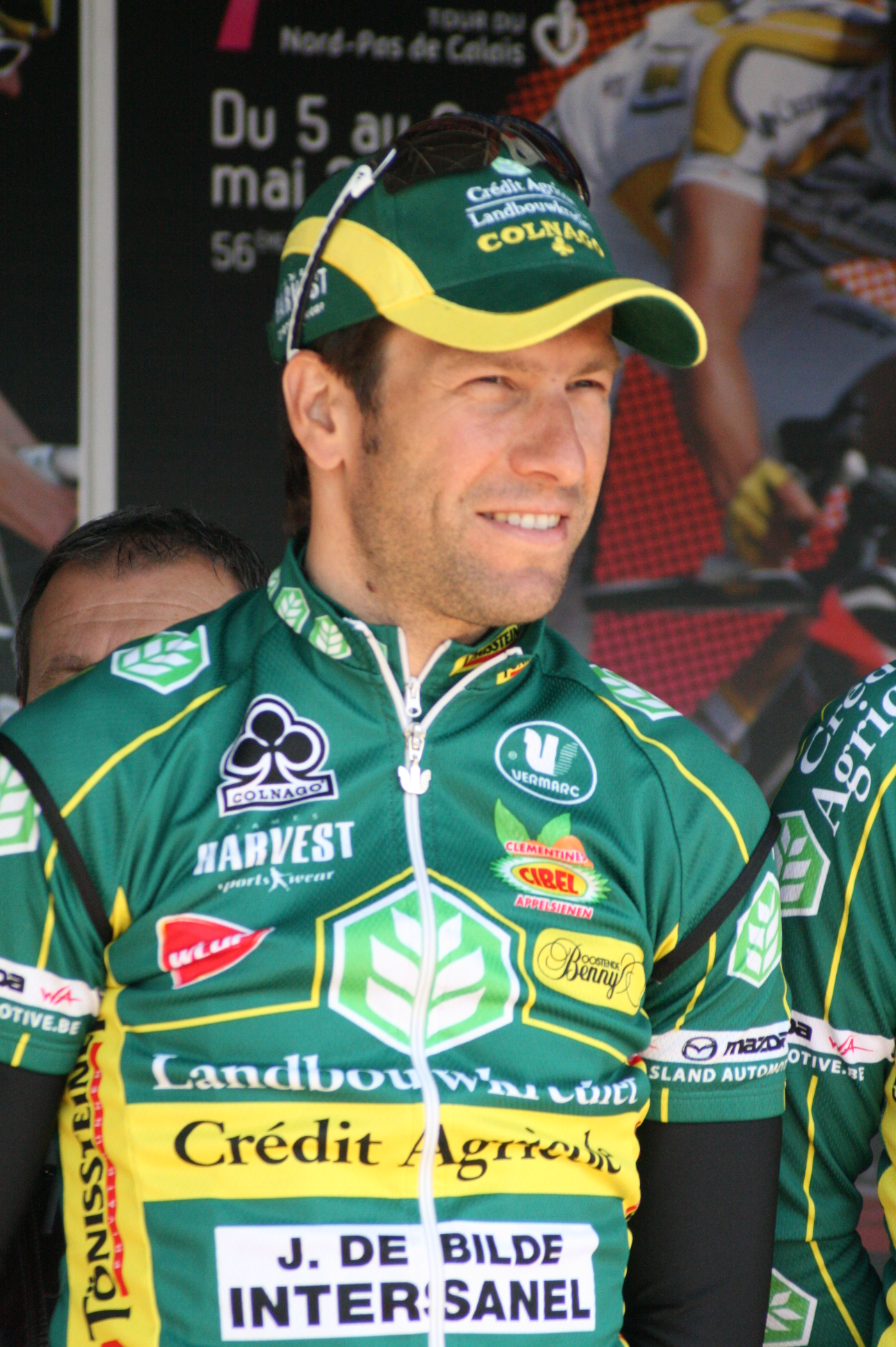 Geert Verheyen lors de la présentation des équipes des 4 jours de Dunkerque 2010